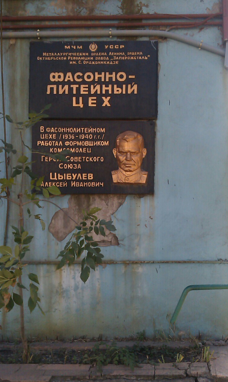 Меморіальна дошка Цибульову О. І. - Герою Радянського Союзу, Запоріжжя, Південне шосе, територія заводу "Запоріжсталь "